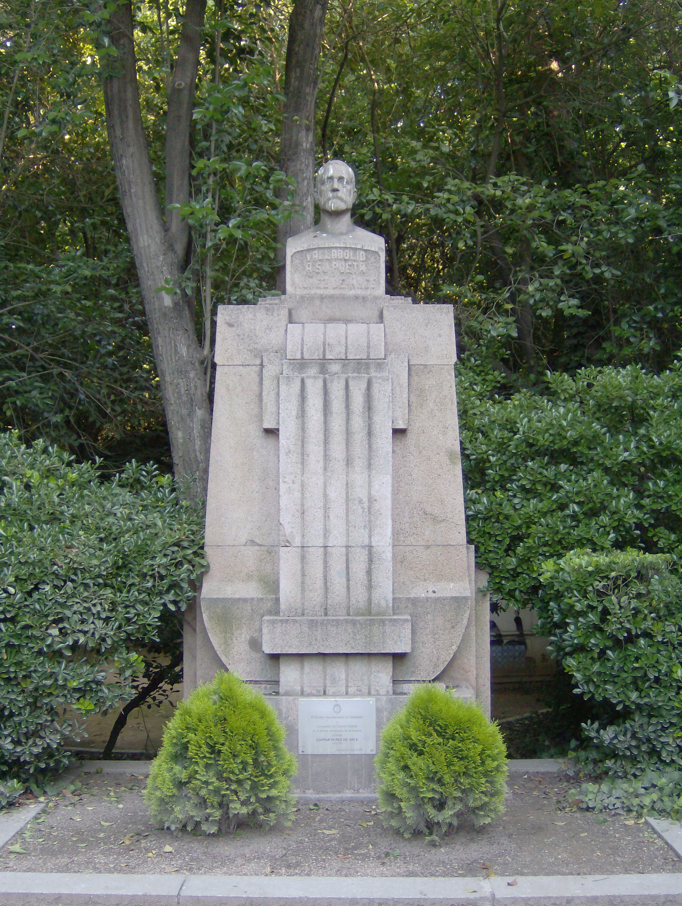 Emiliano Barral: Busto_Nuñez_Arce en el Campo Grande de Valladolid. El monumento se esculpió en granito rojo de Ávila, y los bancos en piedra de Sepúlveda. Se inauguró el 20 de septiembre de 1932.